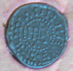 denár Huga Kapeta